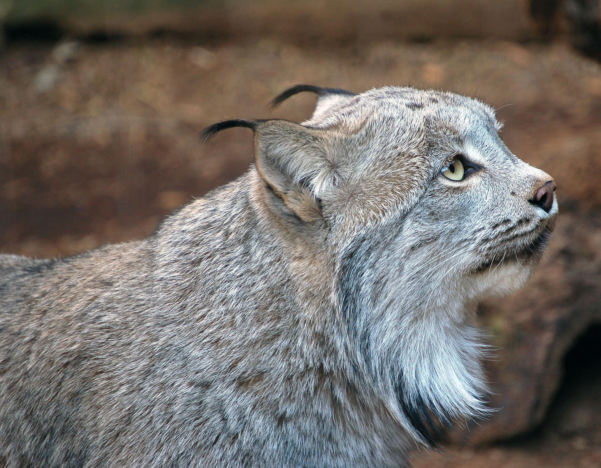 Lynx canadensis Philadelphia Zoo